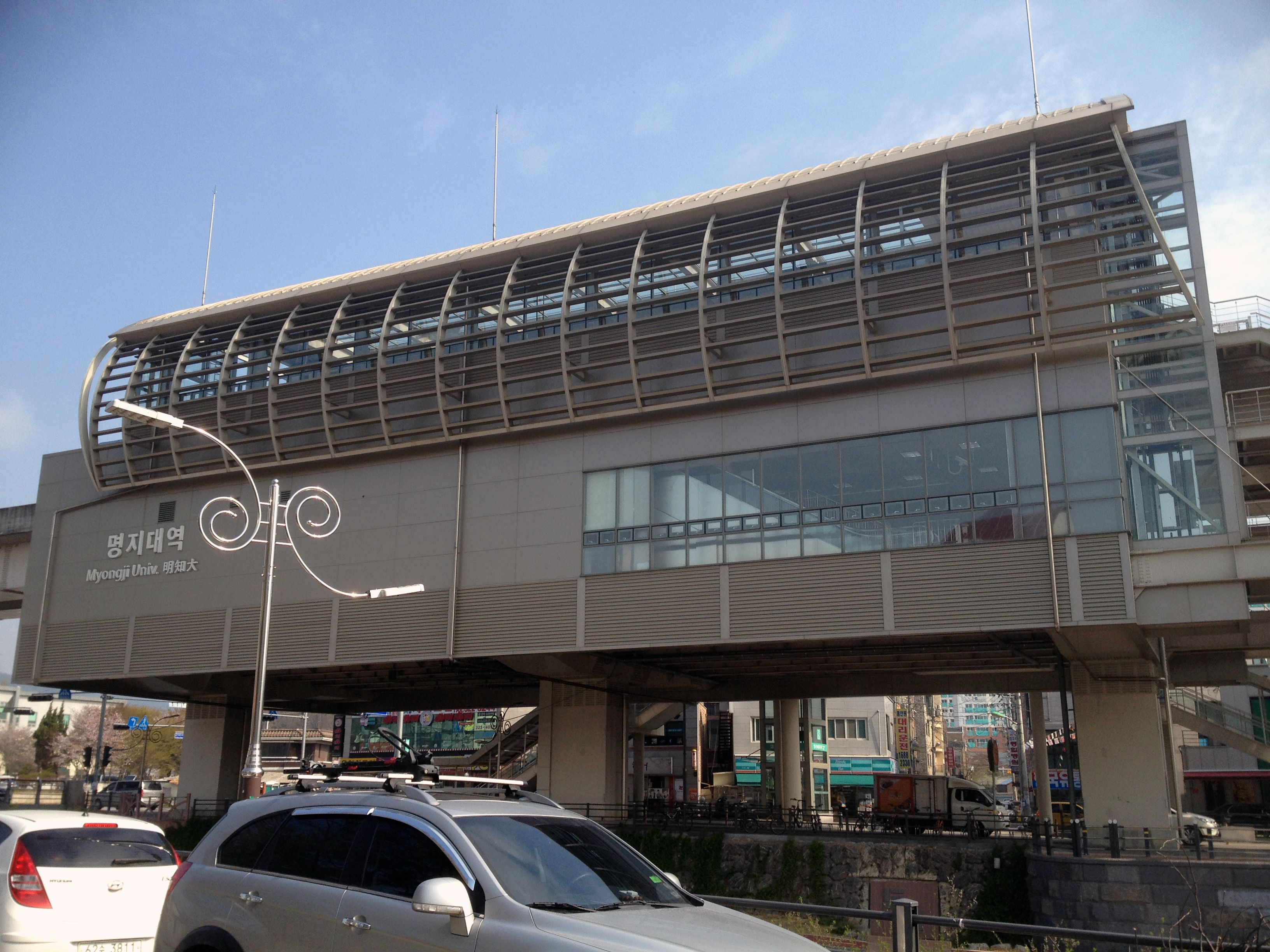 명지대역 역사